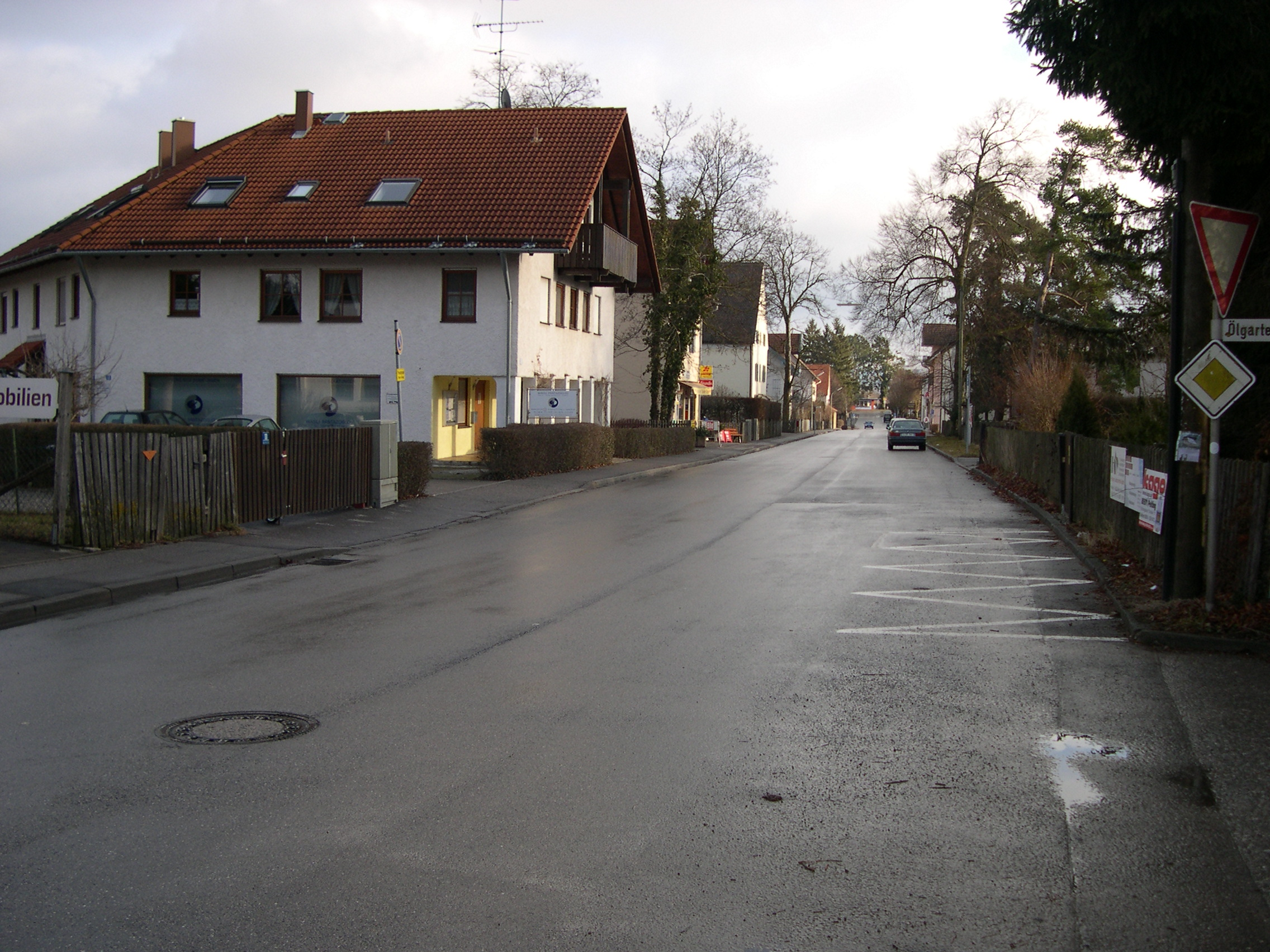 Bahnhostraße in Utting am Ammersee im Januar 2008